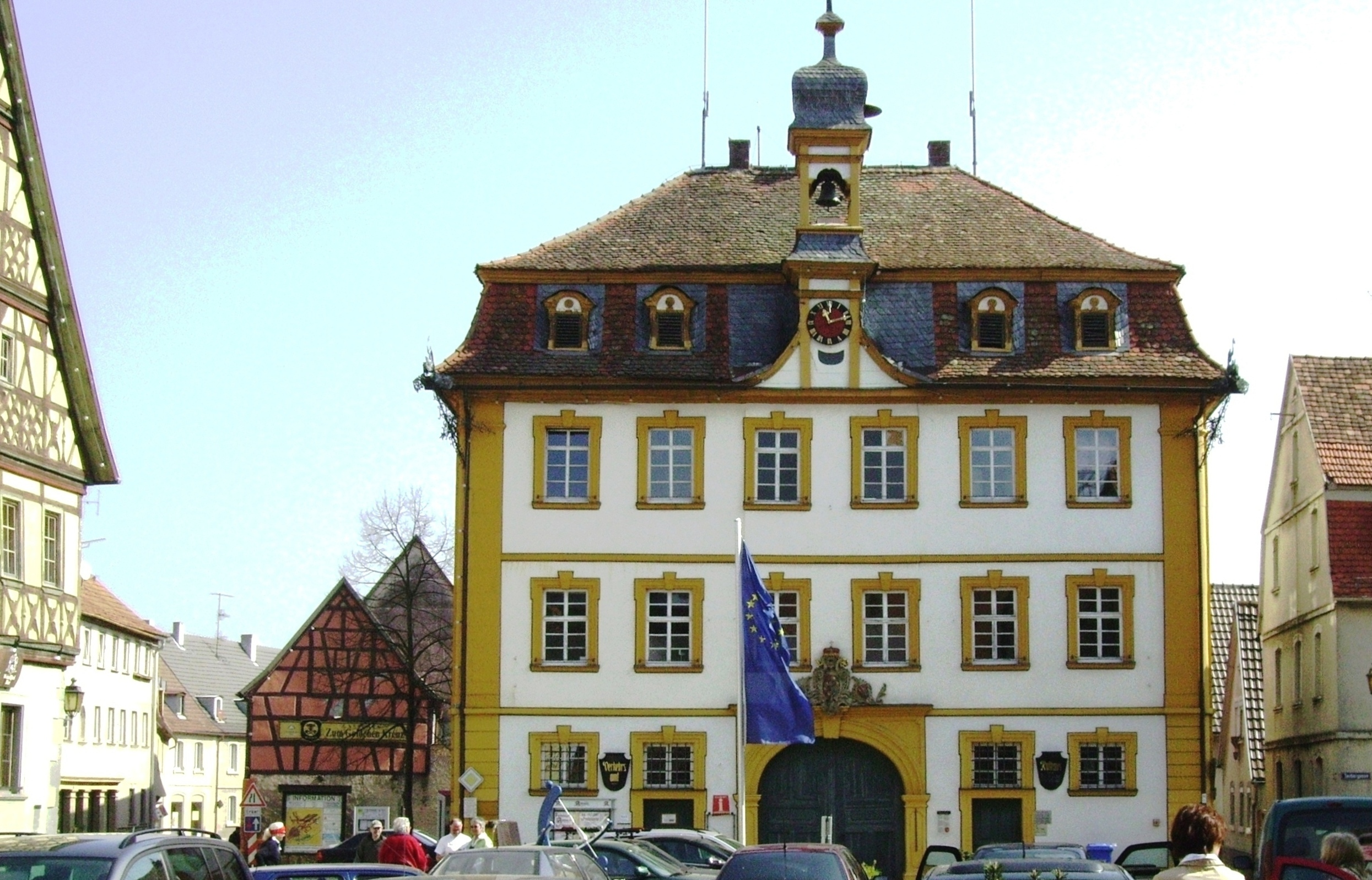 das barocke Rathaus in Röttingen